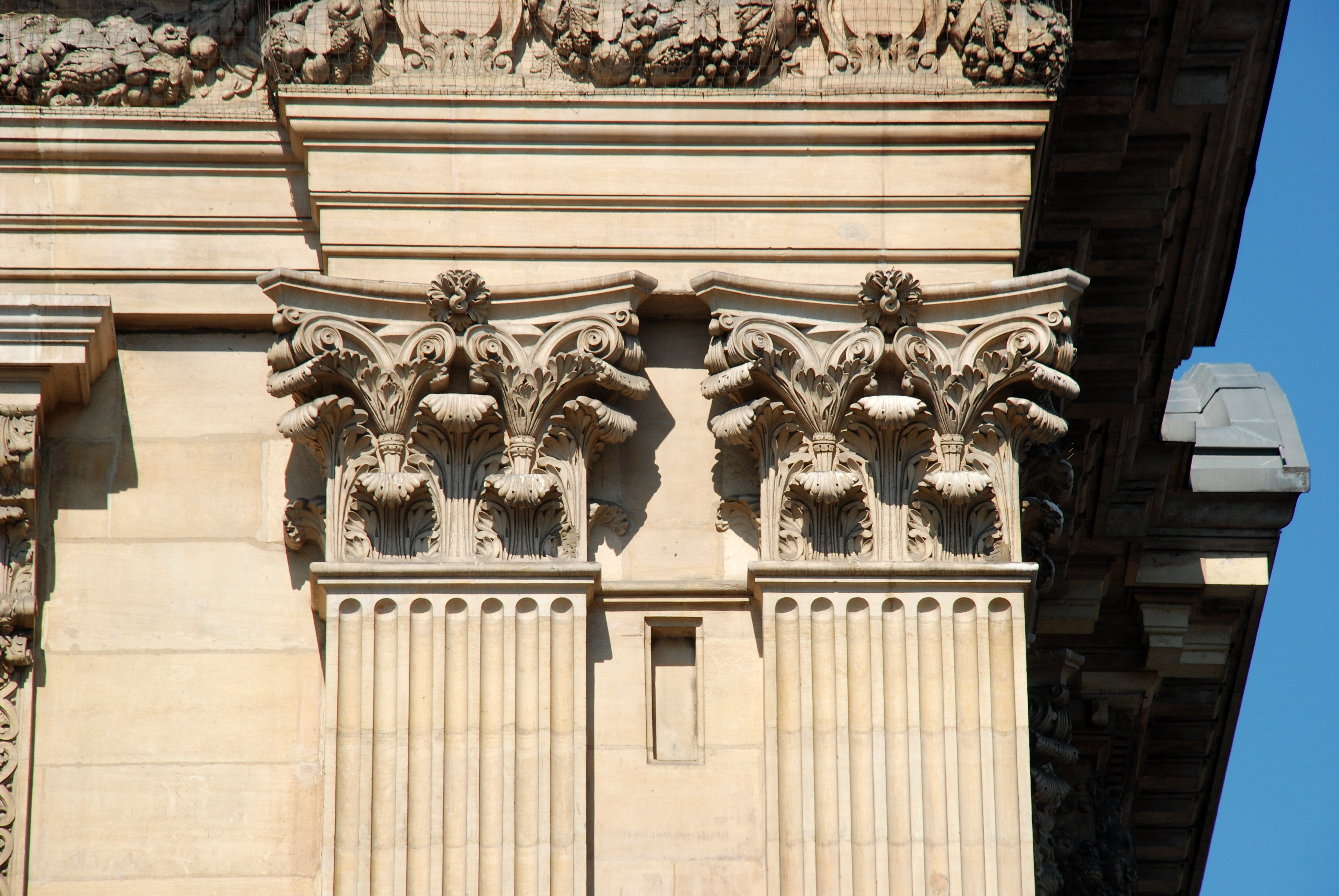 Belgique - Bruxelles - Bourse - chapiteaux